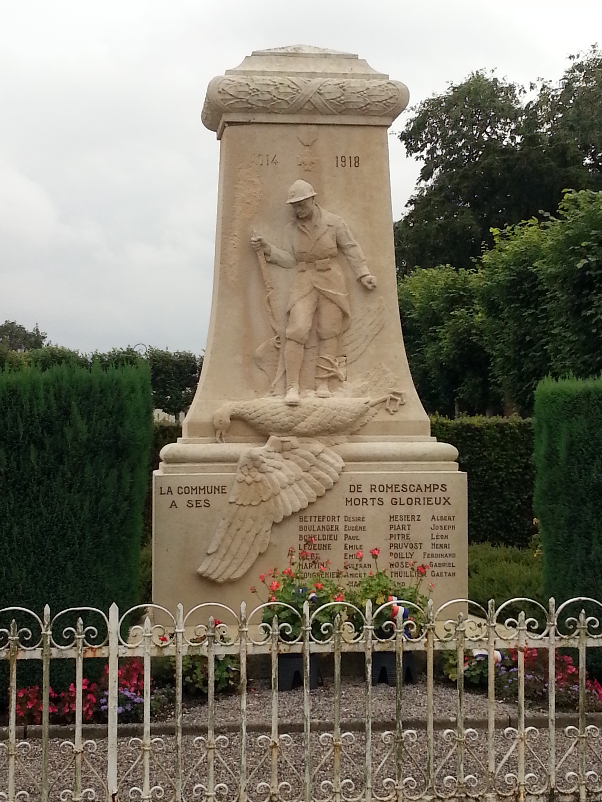 Monument aux morts de Romescamps